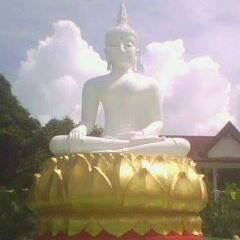 พระพุทธรัตนมณีมหามงคลชัย